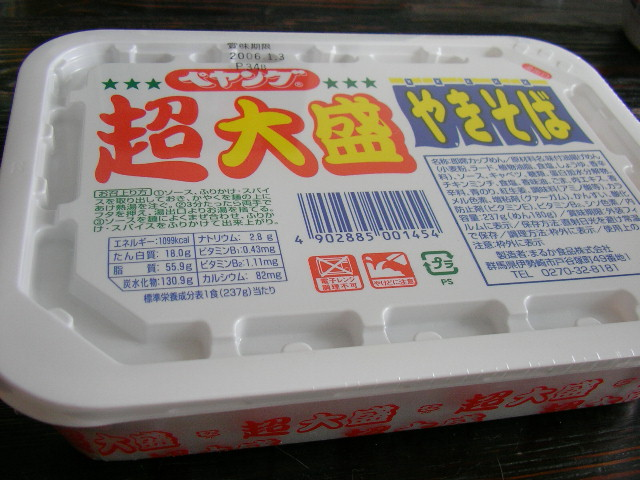 Peyoung Super big yakisoba ペヤング超大盛やきそば